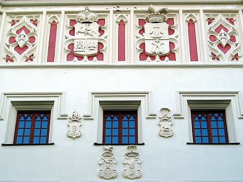 Herby na elewacji Pałacu w Starejwsi, fot. Tomasz Goździewicz 26.05.2003 r.